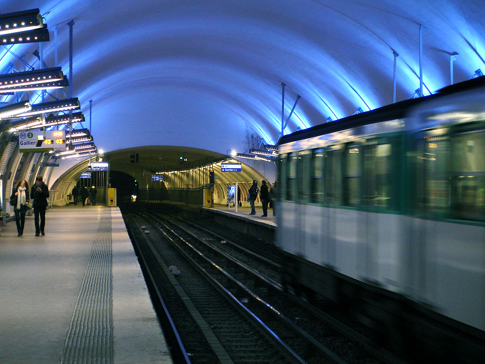 La station Gambetta de la ligne 3 du métro de Paris, France. On distingue au fond l'ancienne station Martin Nadaud.